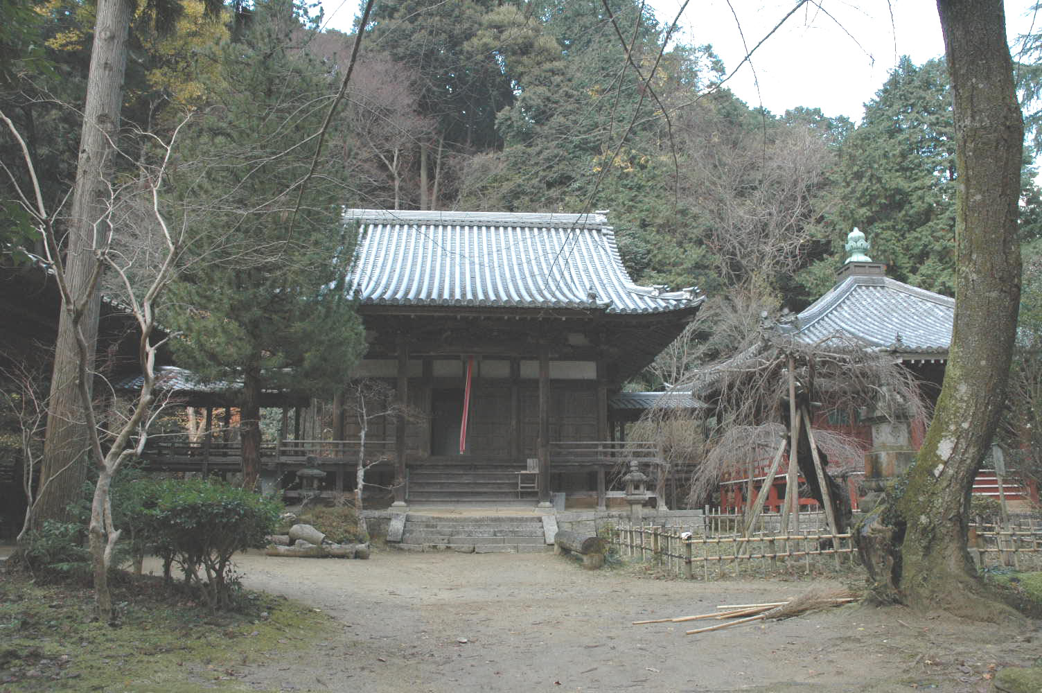 高貴寺（大阪府南河内郡河南町平石）Kokiji, Taishi, Osaka, Japan 撮影者：投稿者 撮影日：2006年12月17日